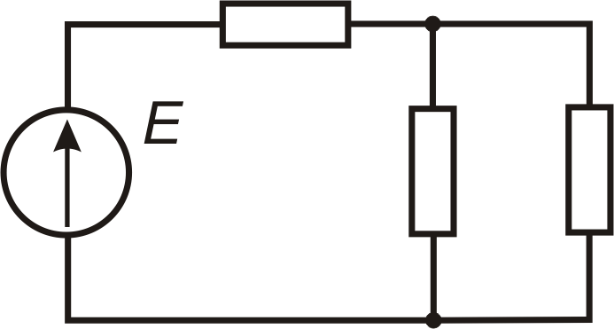 Рисунок 2 — Разветвленная цепь.